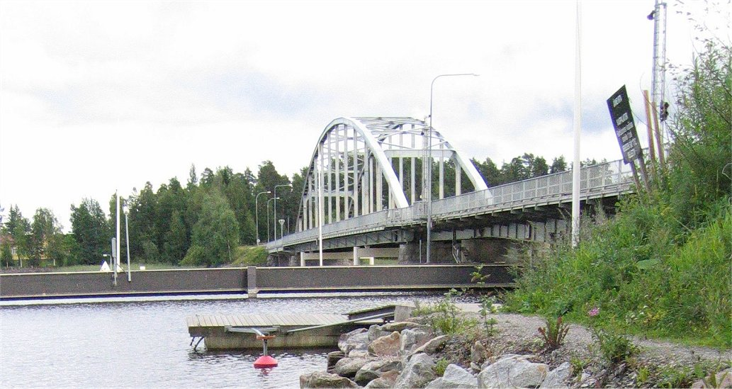 Jännevirran silta on Kuopion ja Siilinjärven rajalla oleva valtatie 9:n silta, jonka pituus on 226 metriä ja joka ylittää Saimaan syväväylän Jännevirran kylän kohdalla. Silta valmistui vuonna 1951, se oli alun perin seitsenaukkoinen ja yhdessä aukossa on Suomen ensimmäinen teräksinen langerpalkkisilta. Sillassa on myös kääntösiltaosa.